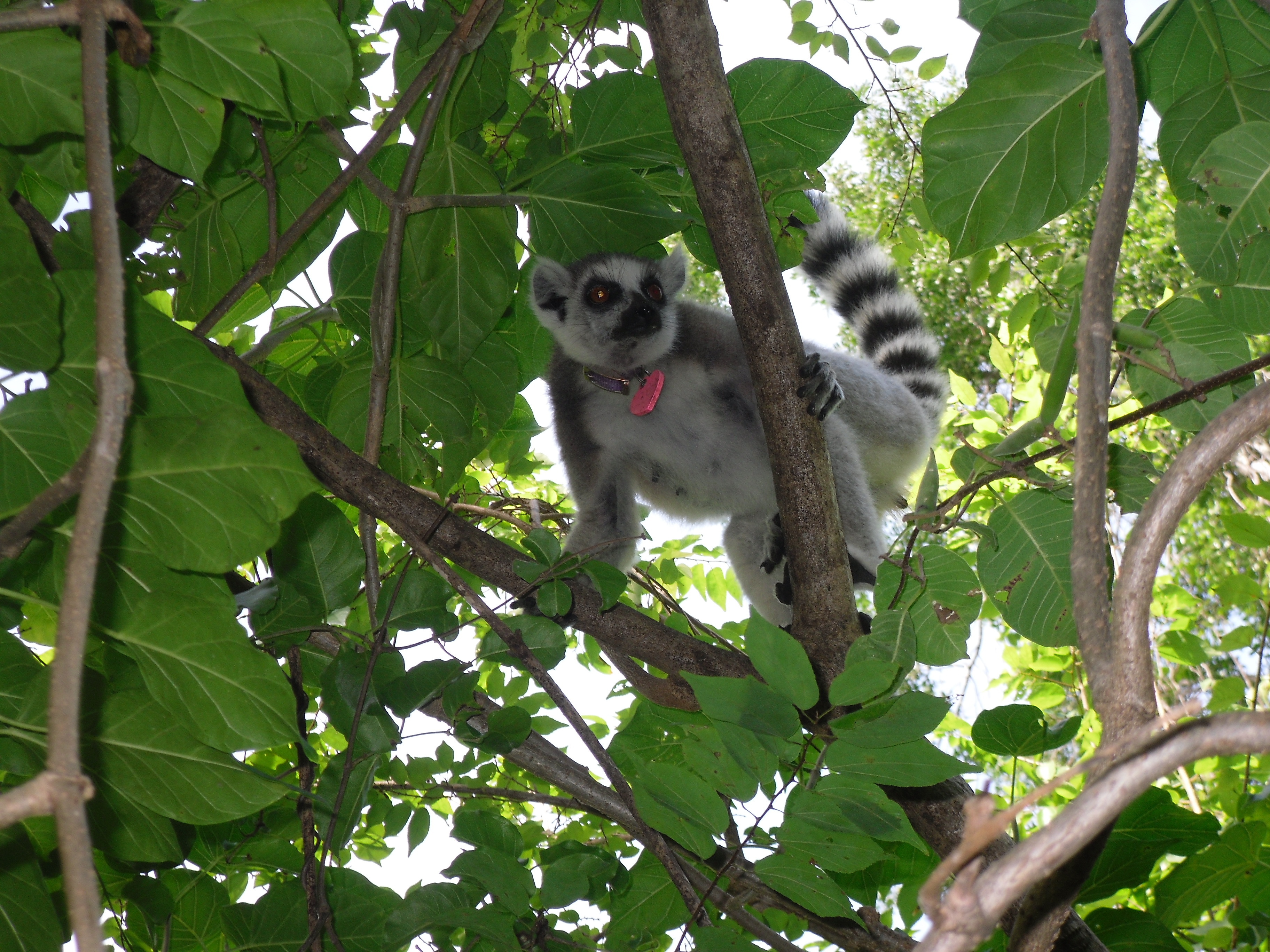 Lemur catta - Riserva speciale di Bezaha Mahafaly